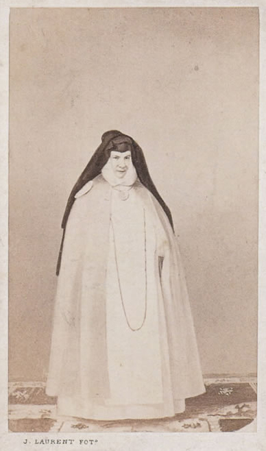 Fotografía de Sor Patrocinio (María Dolores Quiroga).